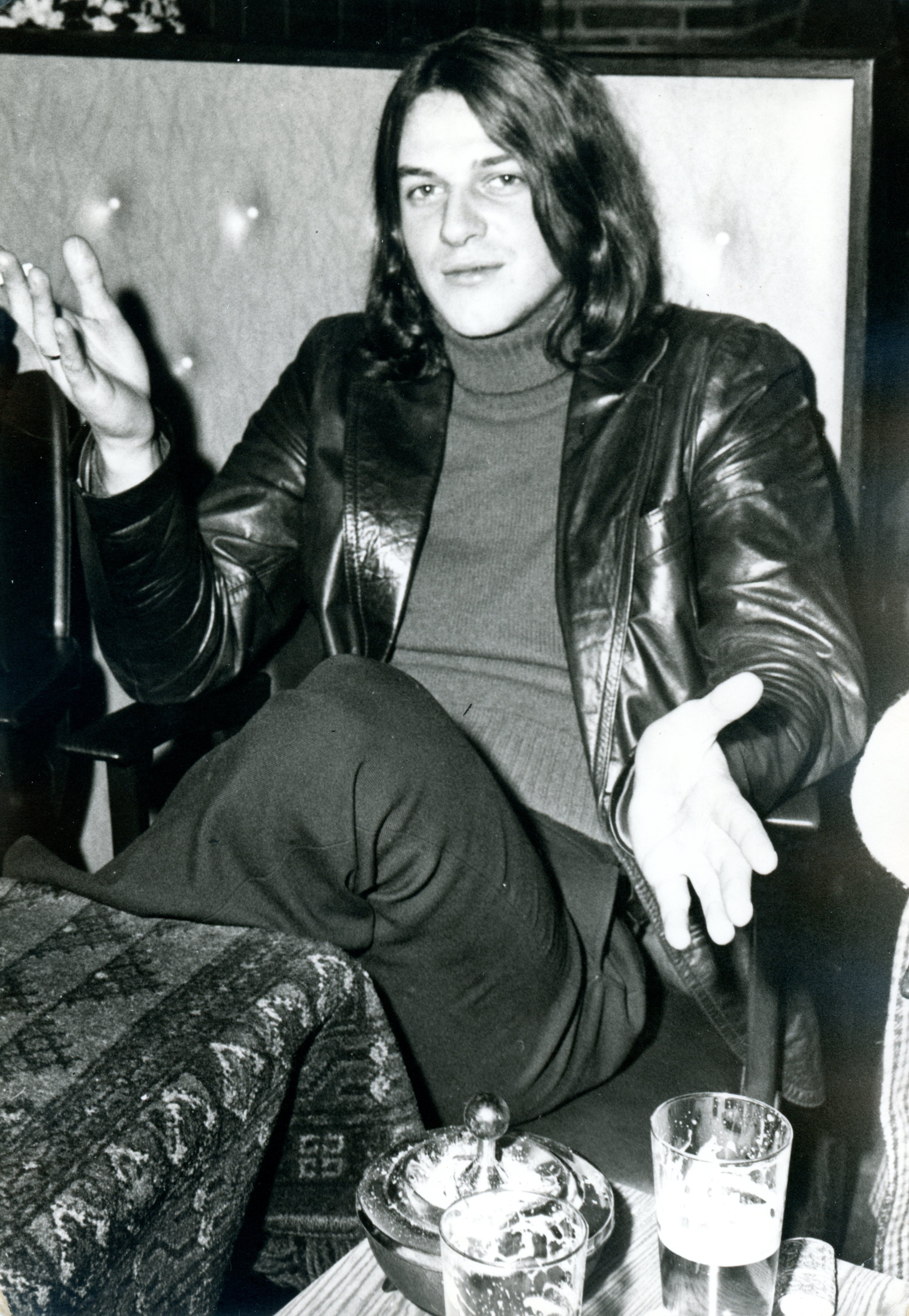 Klaasje van der Wal is een Nederlandse popartiest die grote successen behaalde met zijn band Shocking Blue